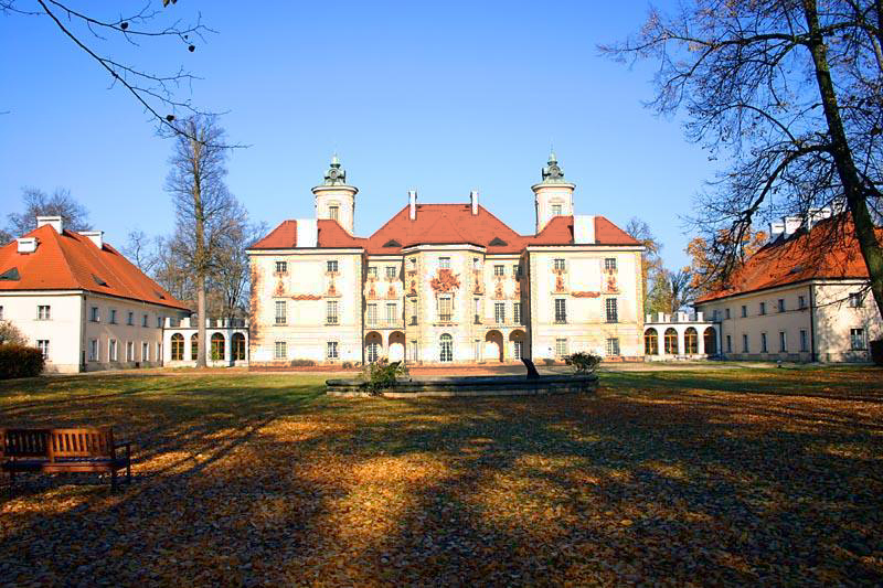 Otwock Wielki in Poland